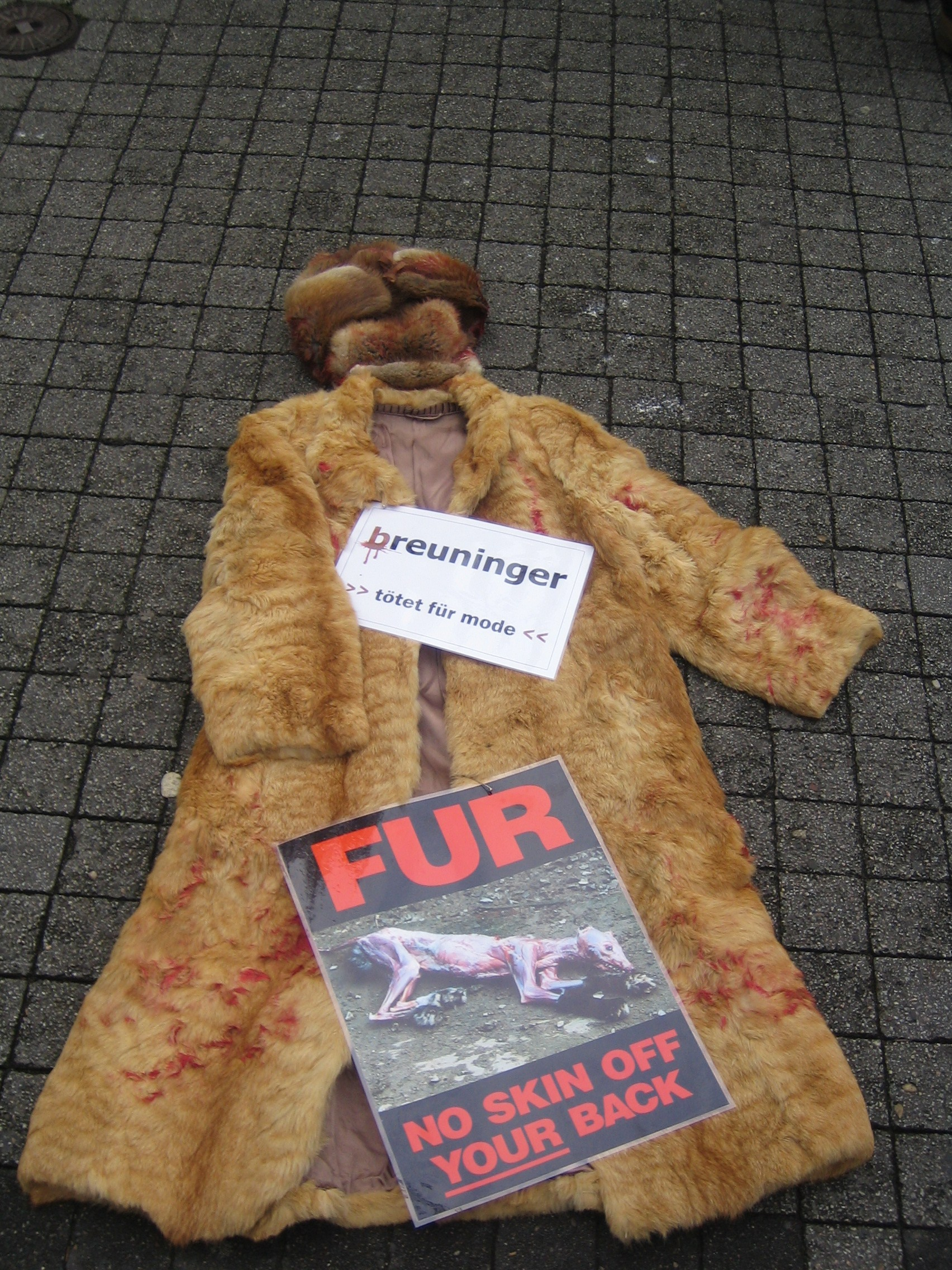 "Blutverschmierter" Pelz als Symbol gegen Breuninger